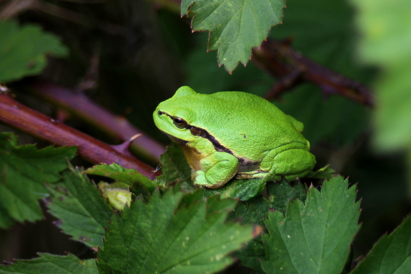 Boomkikker in De Brand (Nederland)